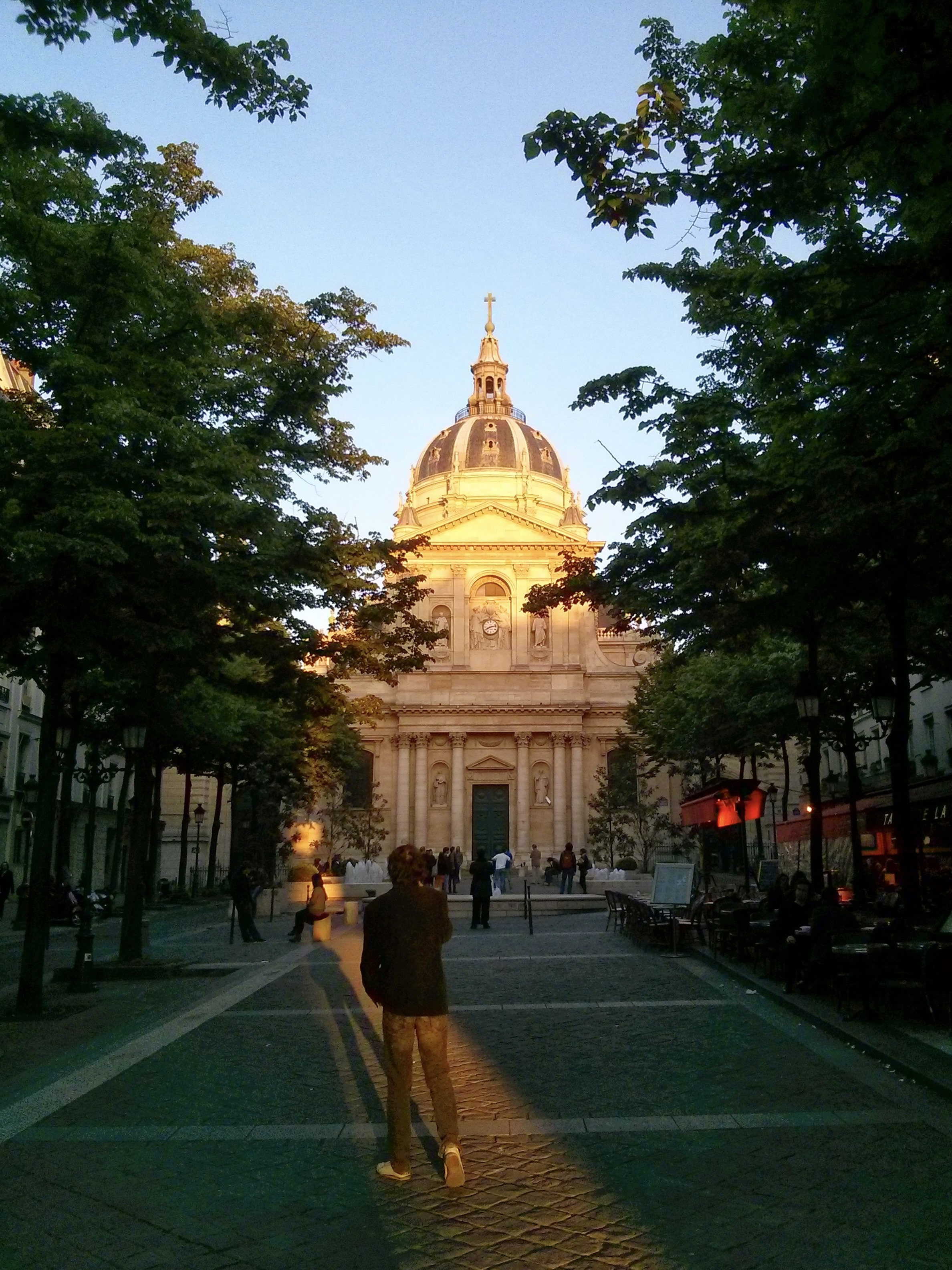 La Sorbonne, Paris